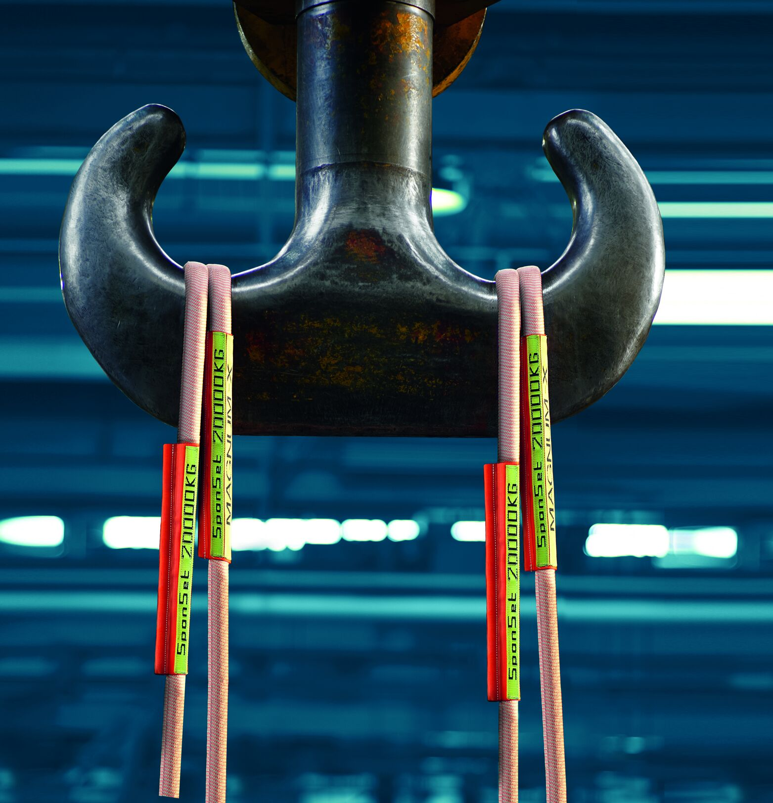 Rundschlinge